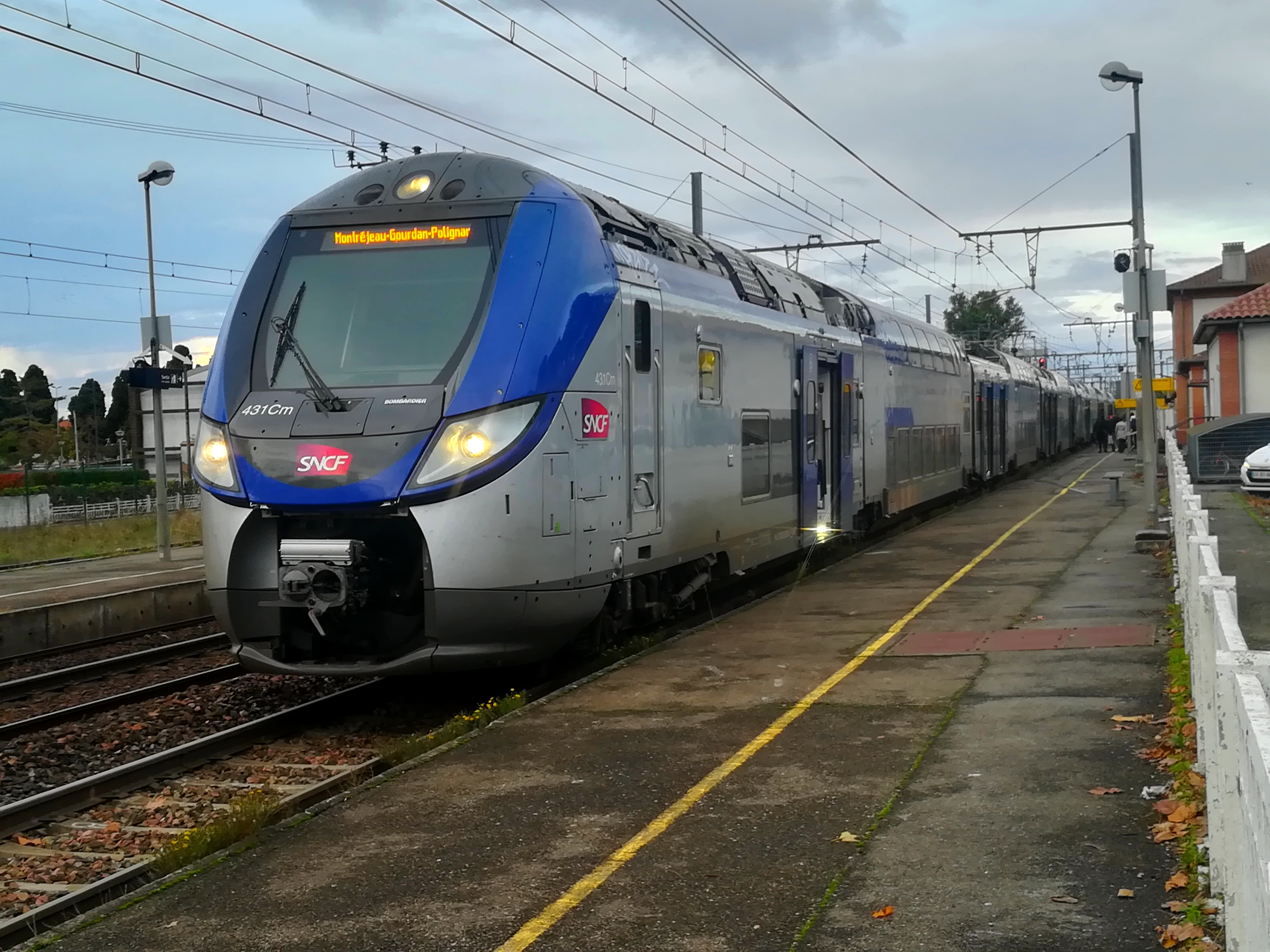 Un Regio 2N à destination de Montréjeau - Gourdan-Polignan en gare de Muret.